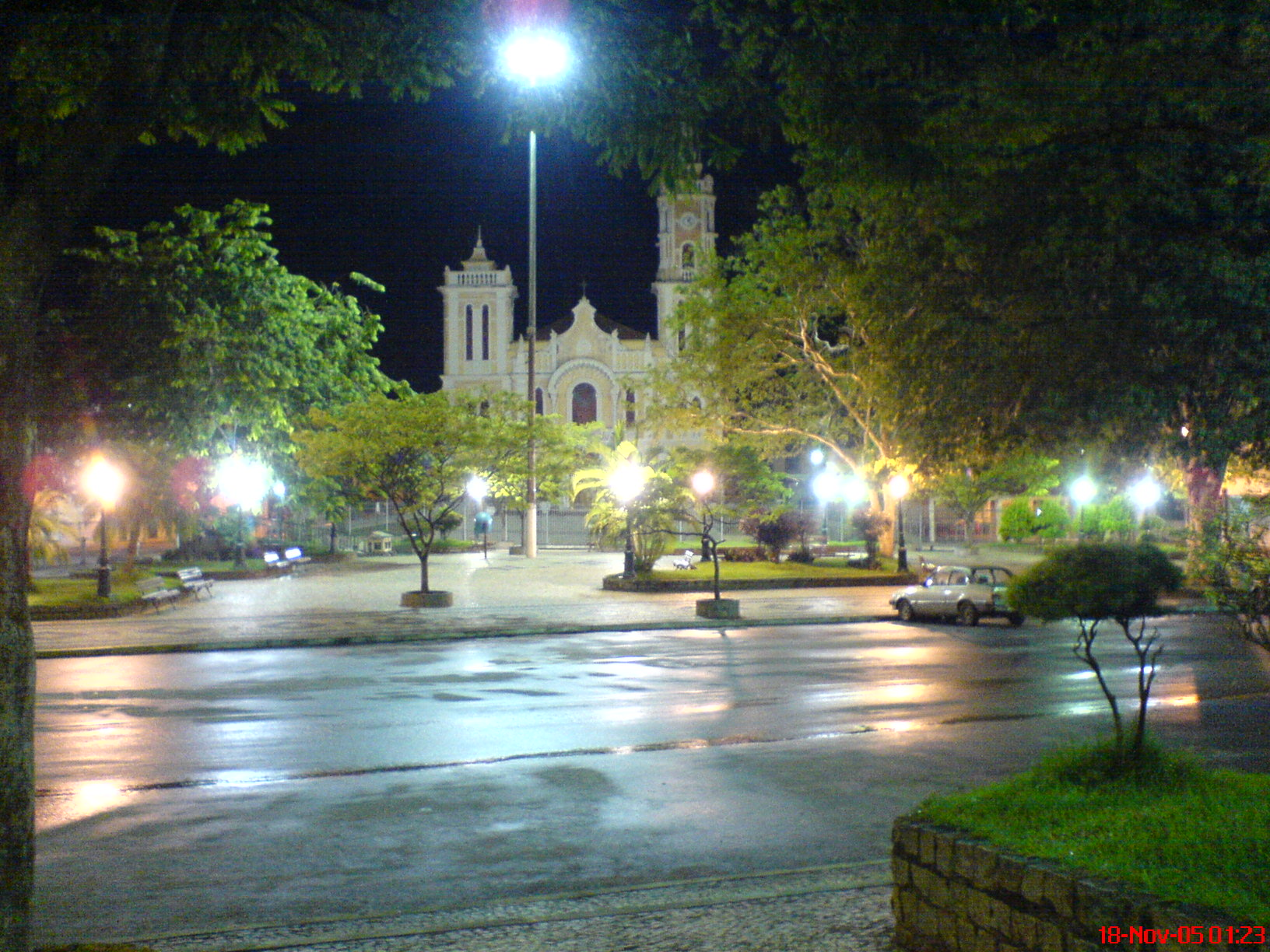 Igreja Matriz do Senhor Bom Jesus